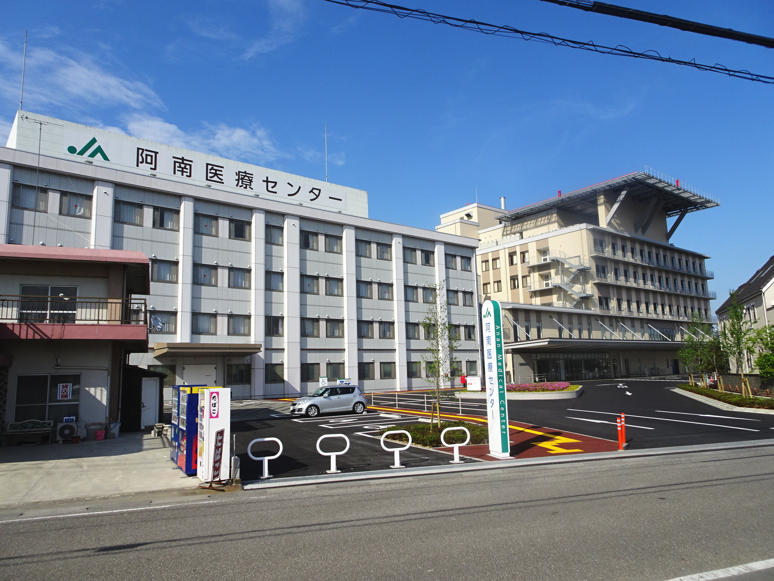 向かって右側が東館(新棟)で、左側が(旧)阿南中央病院既存棟。